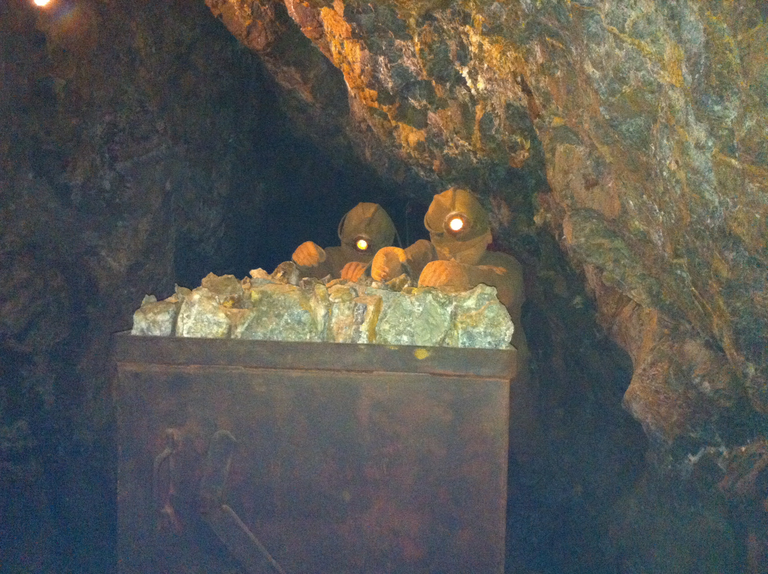 Mina del Edén, Zacatecas Reproducción de antaño sobre la extracción del mineral desde las entrañas de la tierra